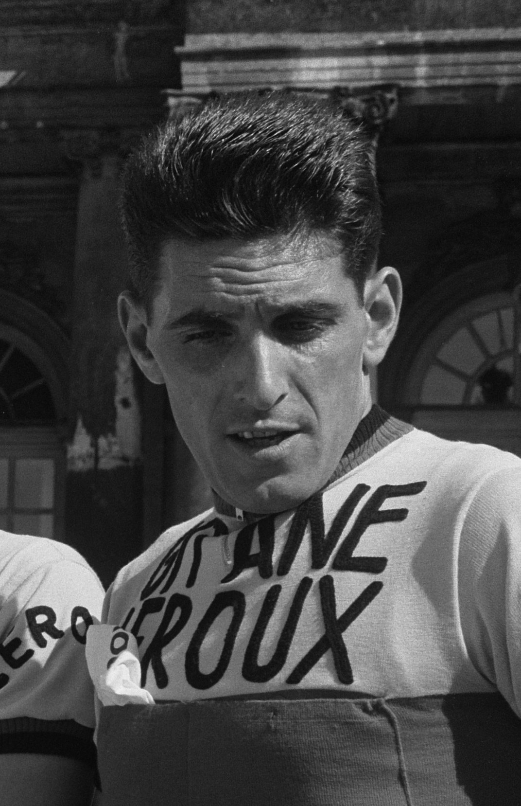 Tour de France 1962 , Ploeg Gitane Leroux.